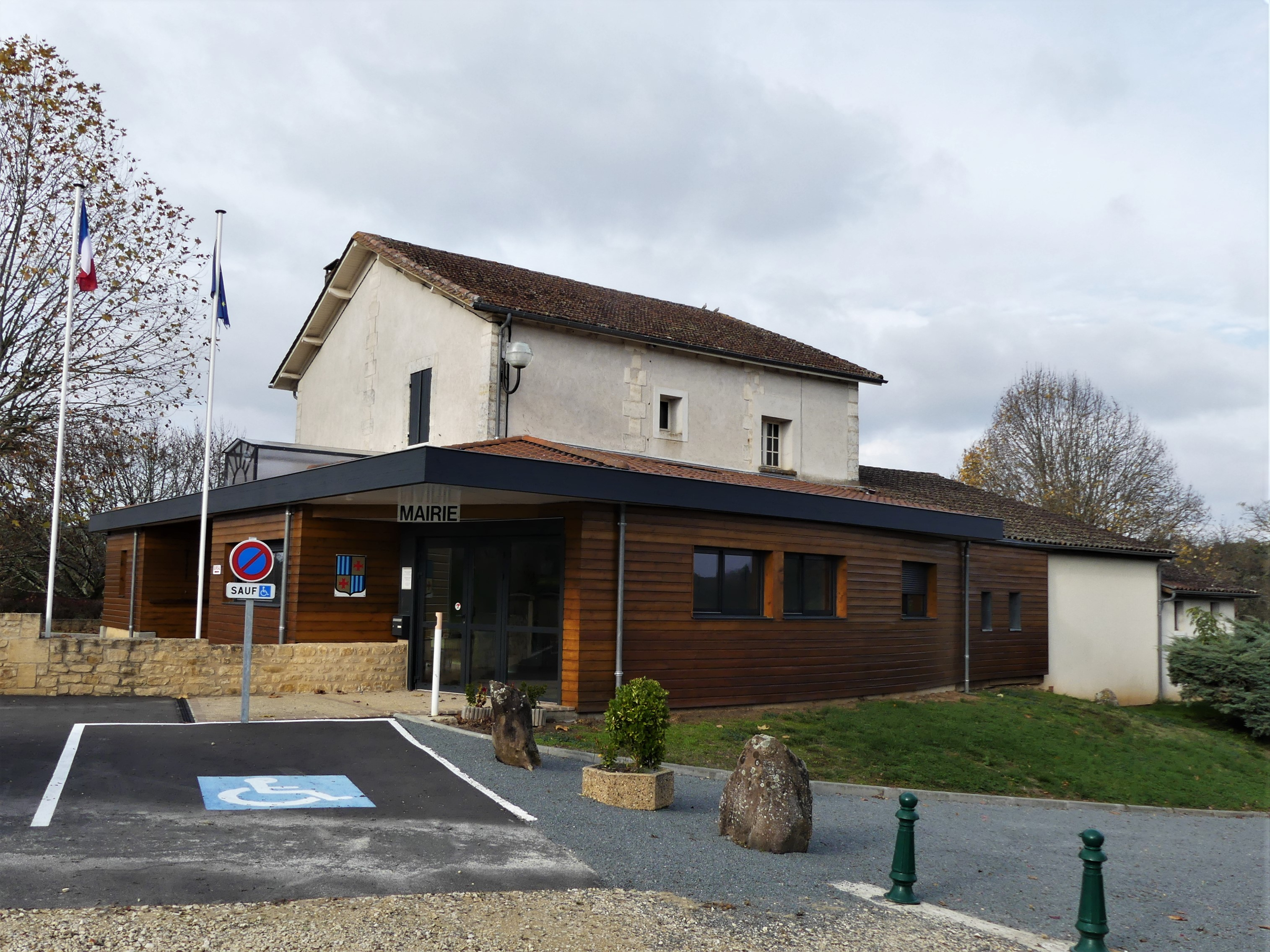 La mairie de Saint-Julien-de-Crempse, Dordogne, France.